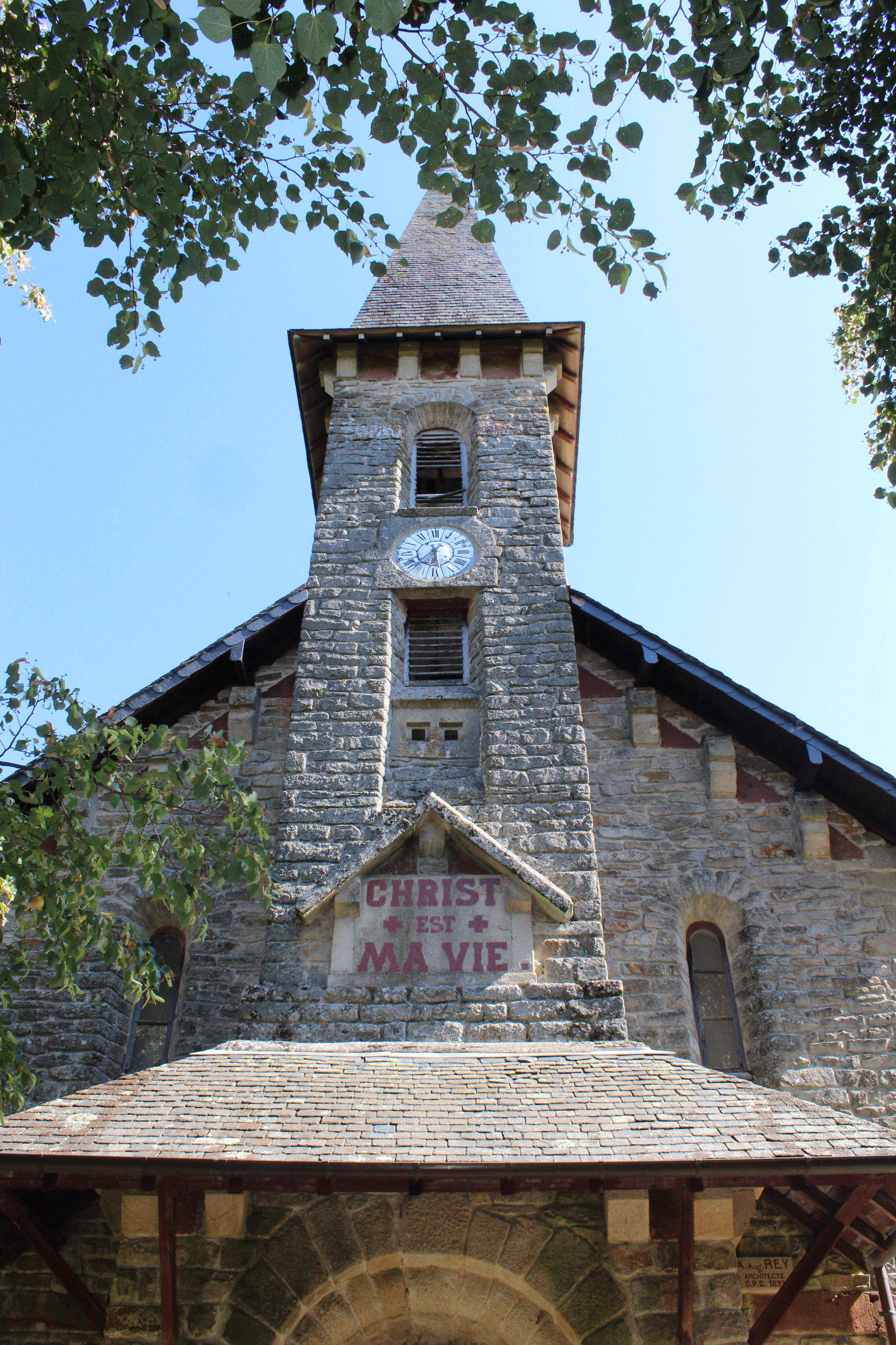 Le temple